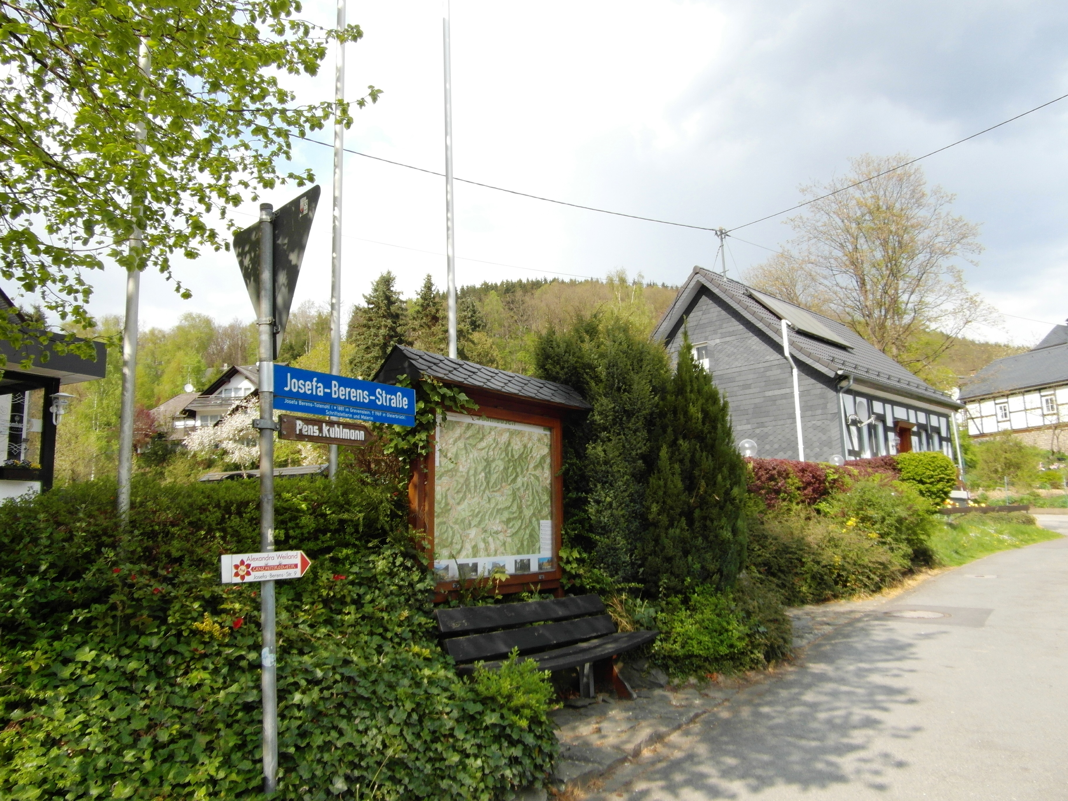 Die Straßenbezeichnung ist wegen der Nähe von Josef B.T zur NS-Ideologie umstritten; sie wird zum 01.01.2015 in "Alter Weg" umbenannt.